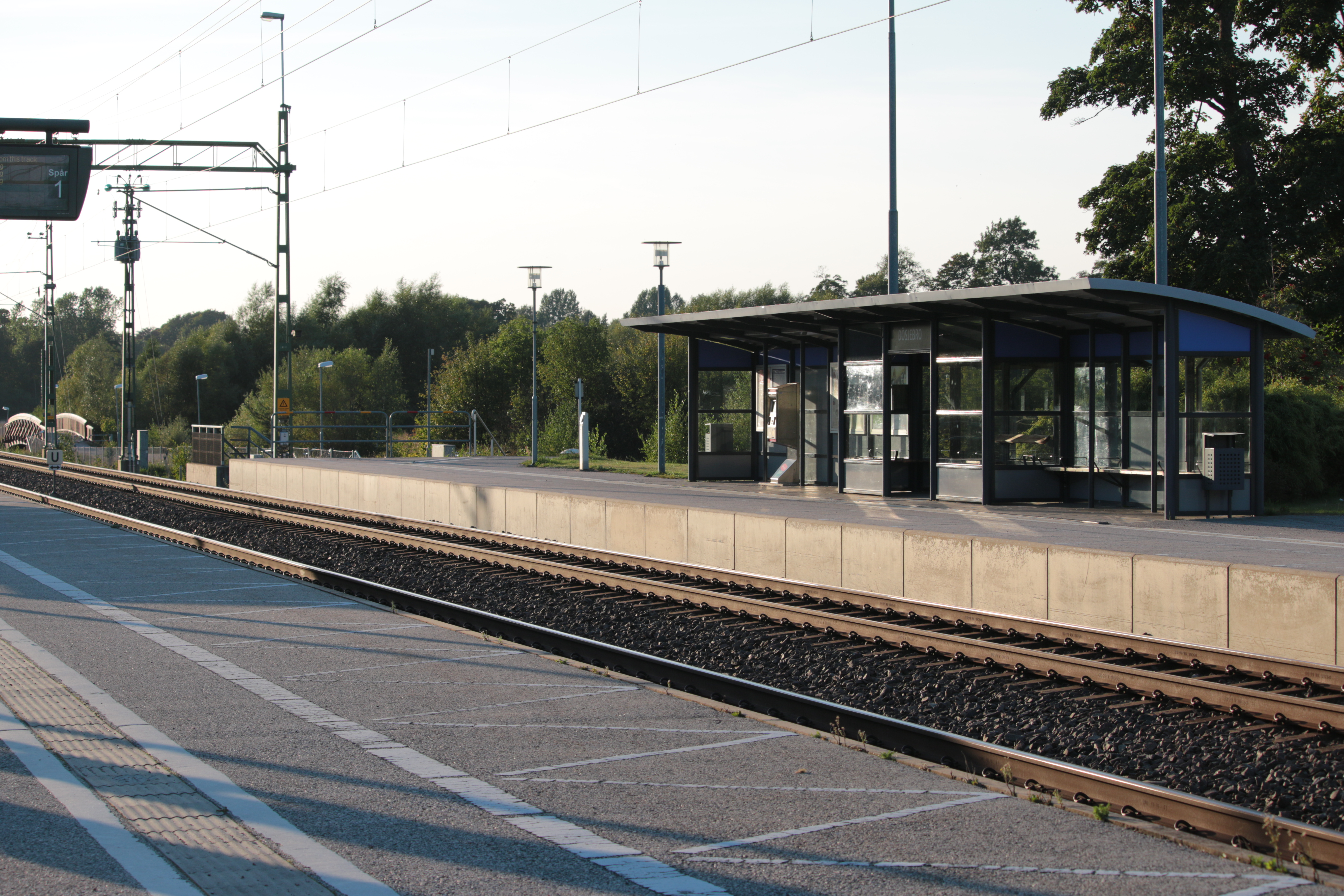 Dösjebro station